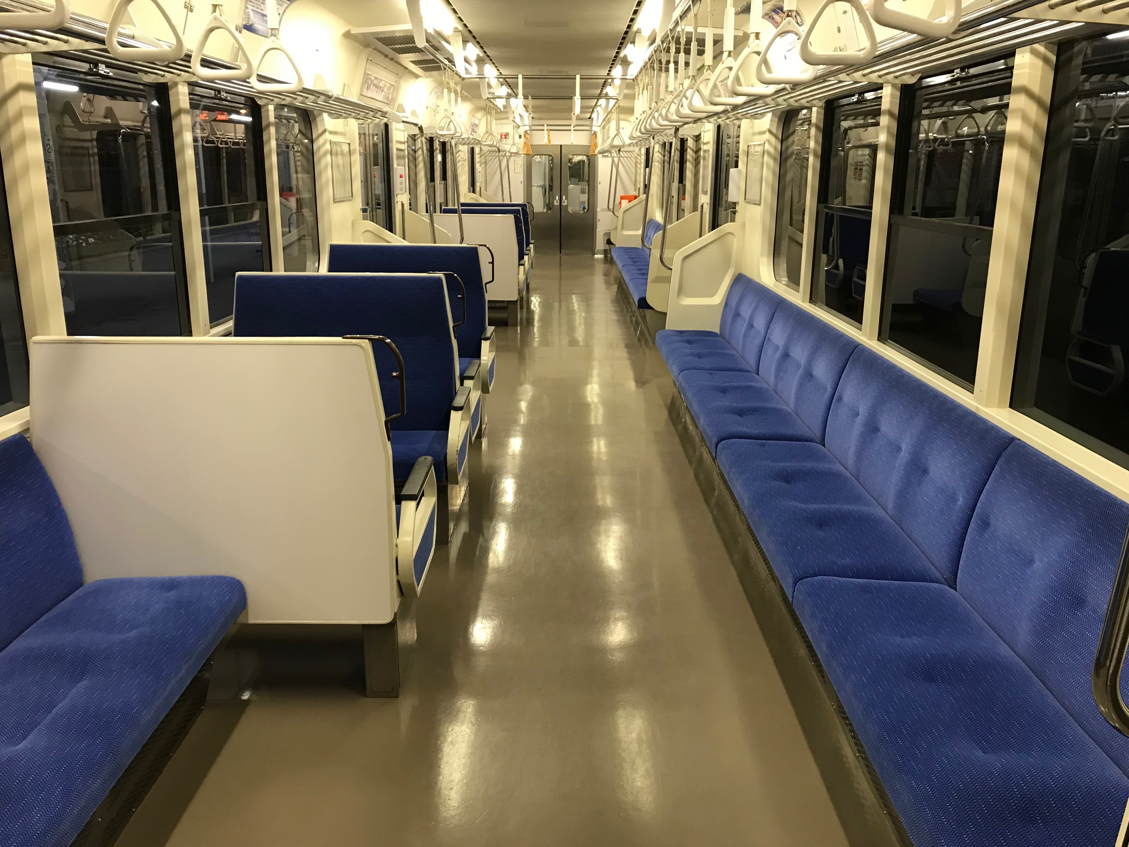 E127系100番台の更新された座席です。